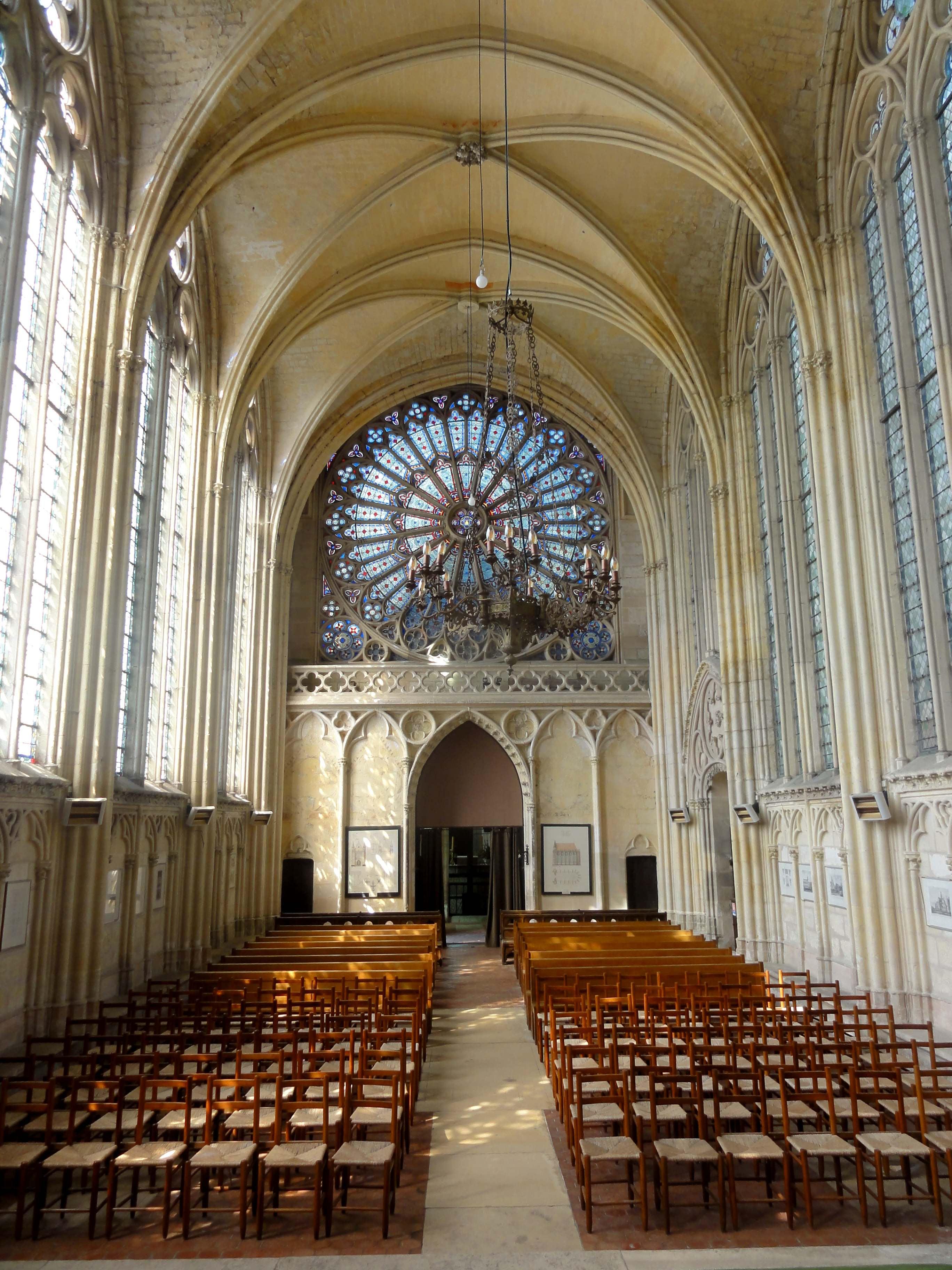 Intérieur de la chapelle de la Vierge (connue comme sainte-chapelle) - voir le titre du fichier.